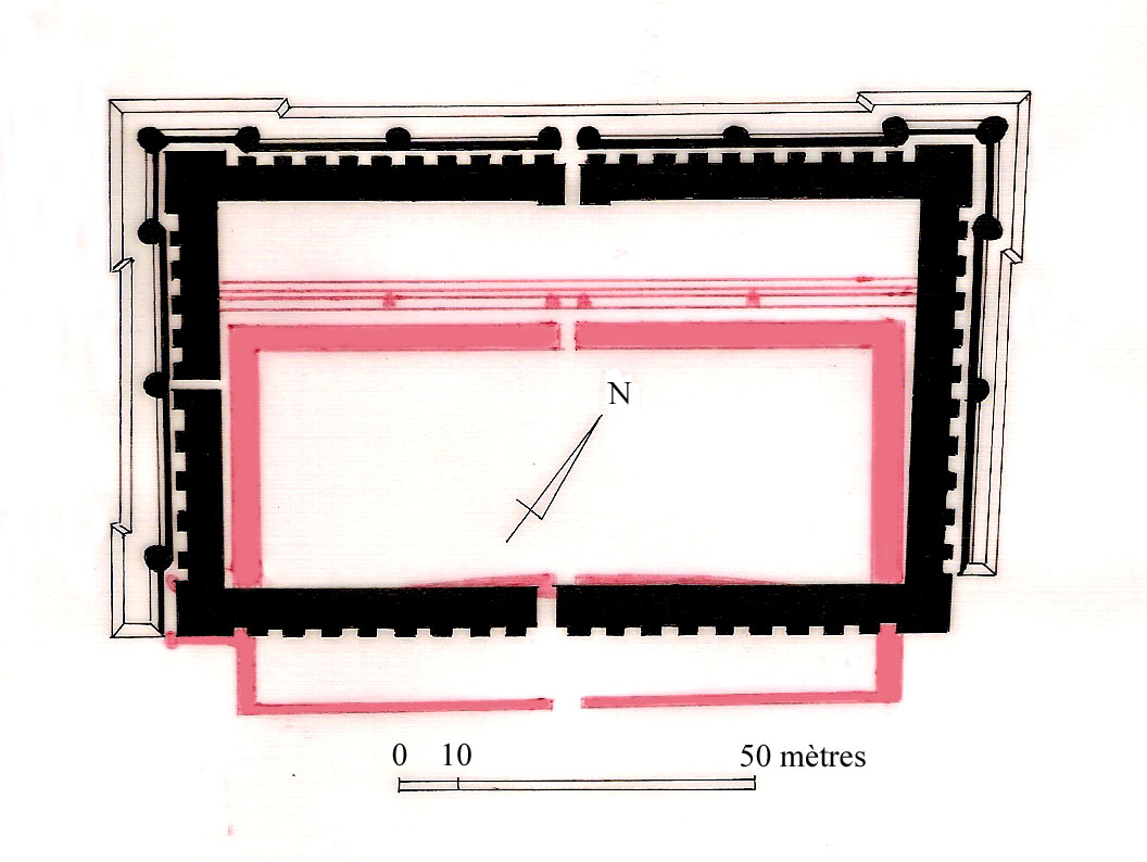 Plan de la forteresse de Aniba en nubie